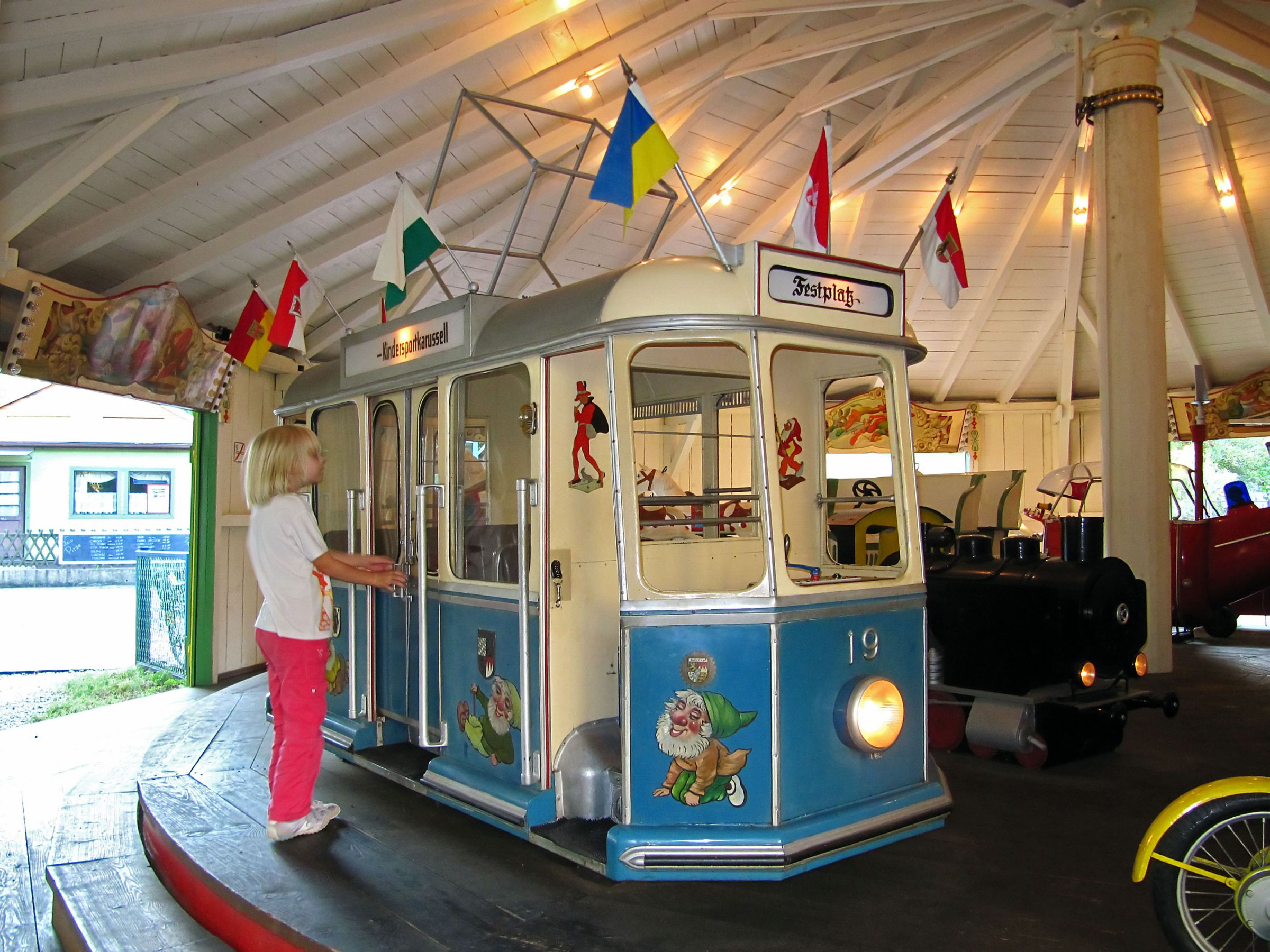 Vergnügungsstätte, Ringelspiel im Böhmischen Prater